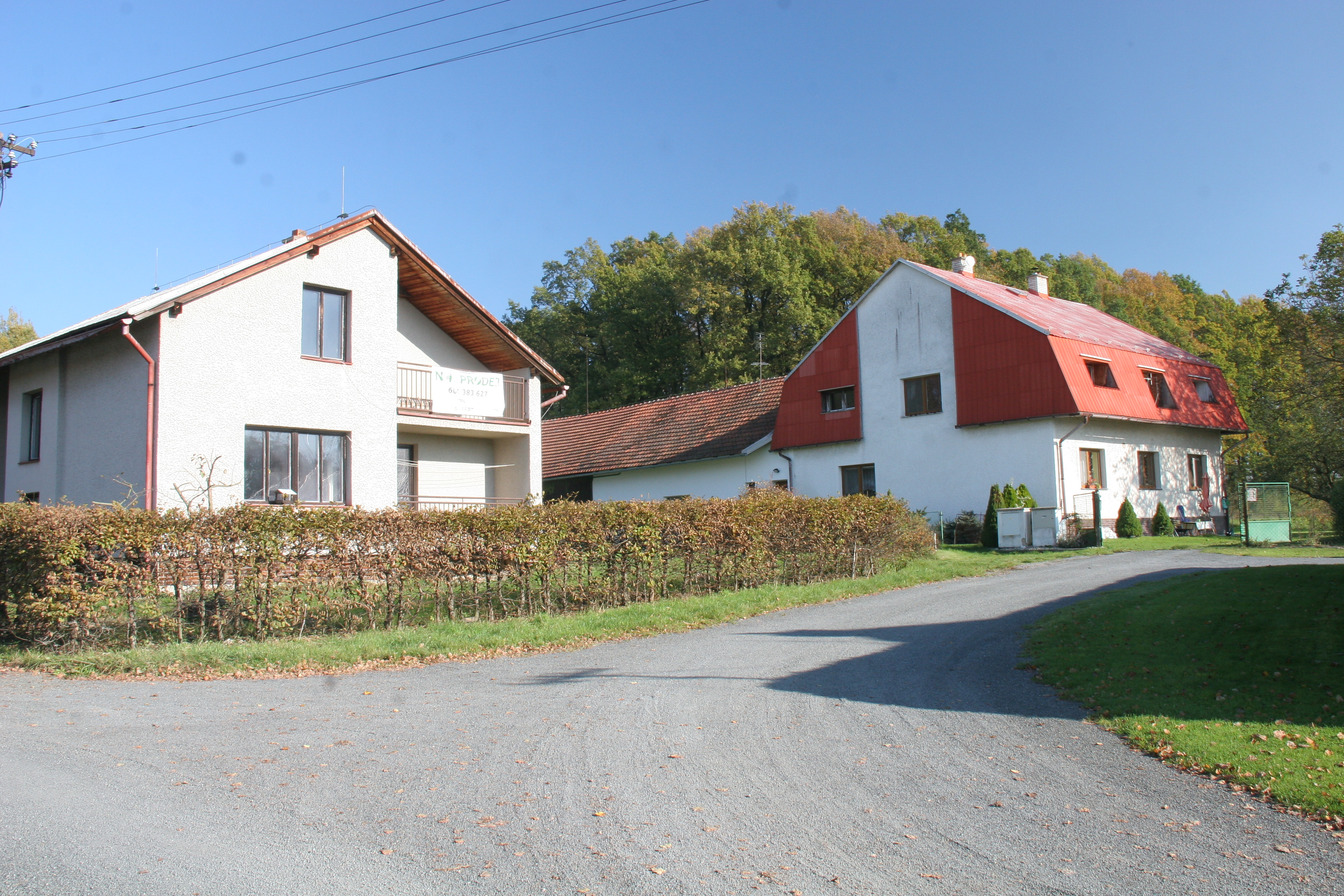 Hluboká čp. 6